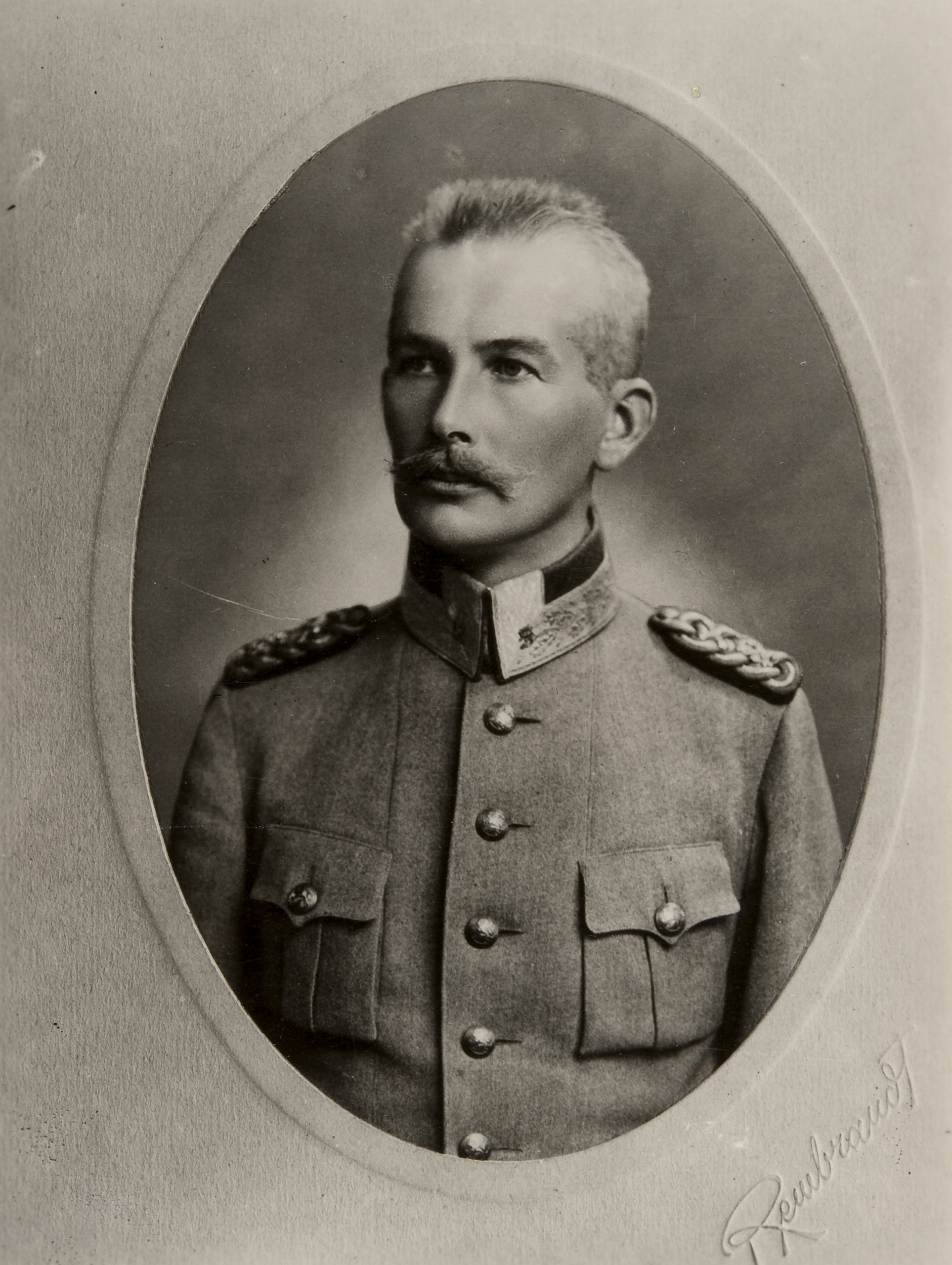 Vilho Nenonen